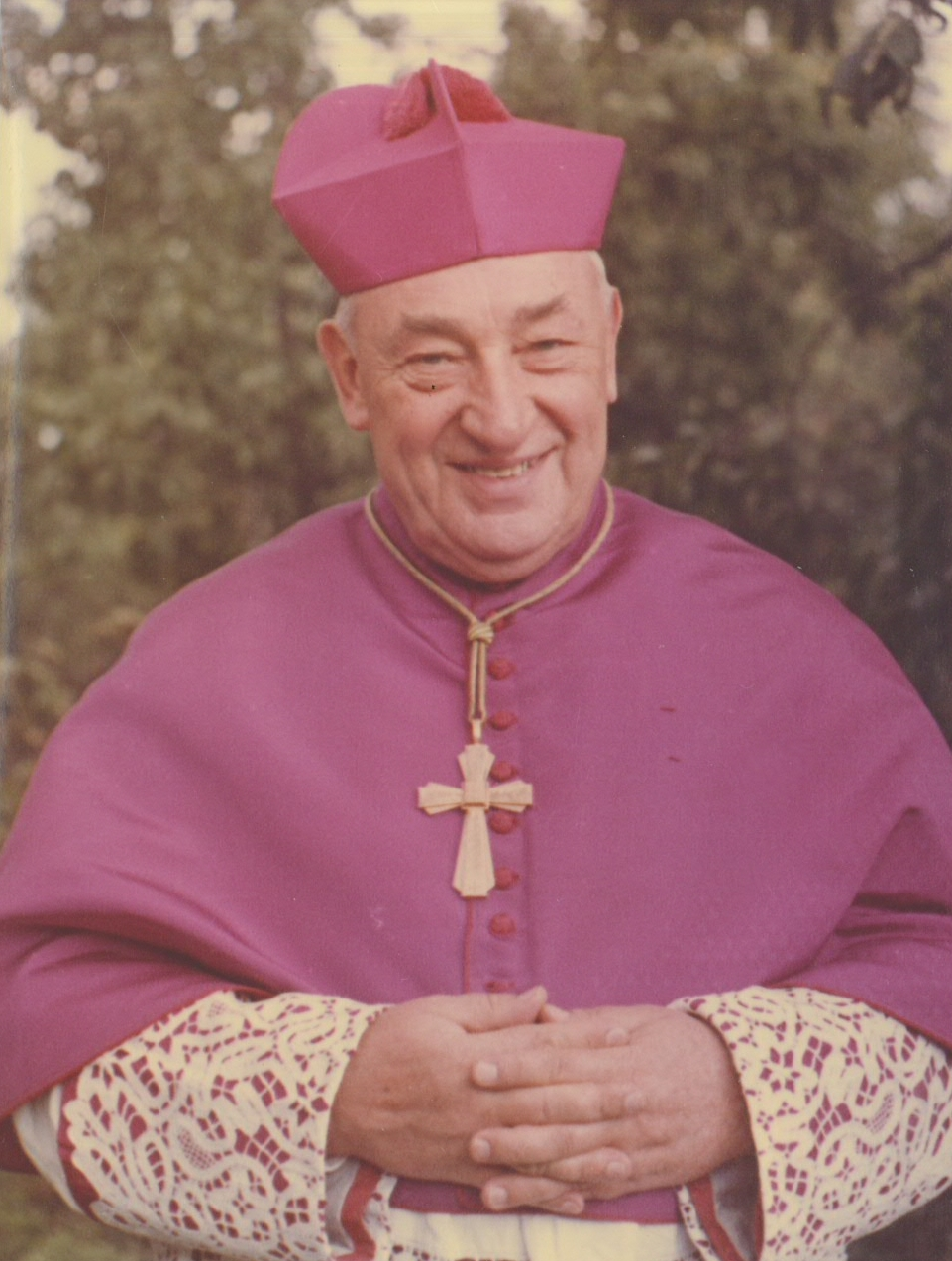 Biskup Štěpán Trochta kolem roku 1970